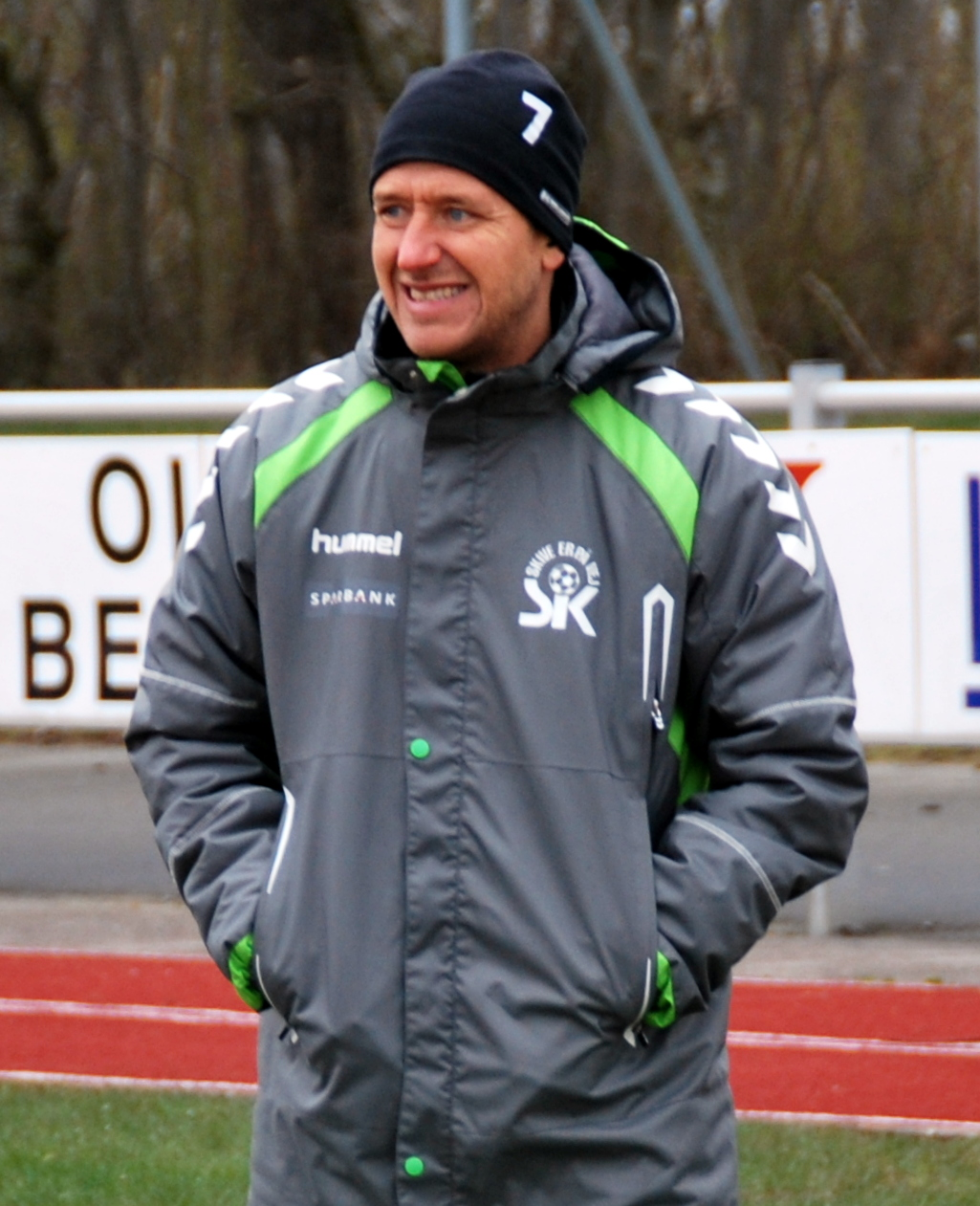 Tidligere fodboldspiller og nuværende assistenttræner Claus Madsen fra Skive IK. Her under en 1. divisionskamp mod Blokhus FC på Skive Stadion.